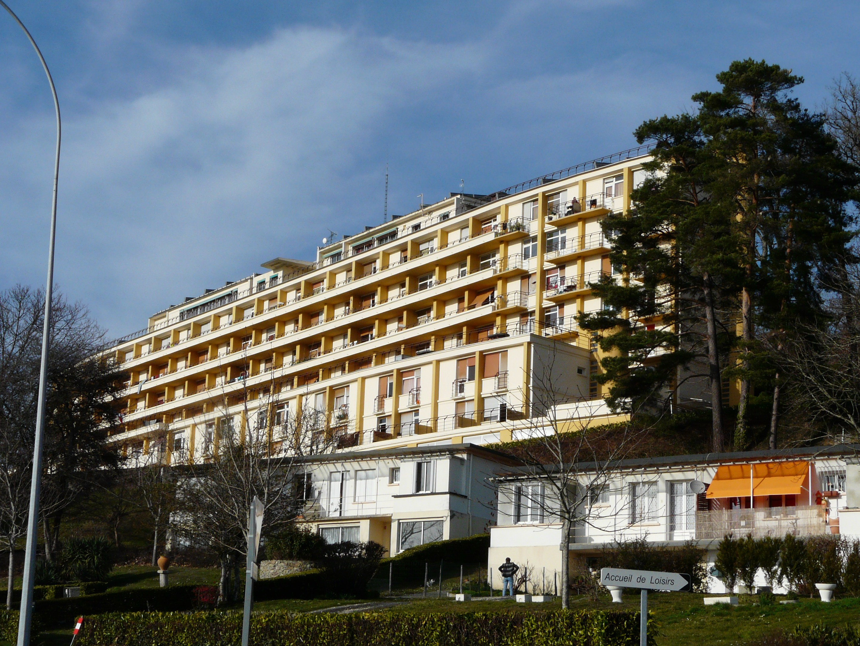 Le grand bâtiment de la cité de Clairvivre, Salagnac, Dordogne, France.